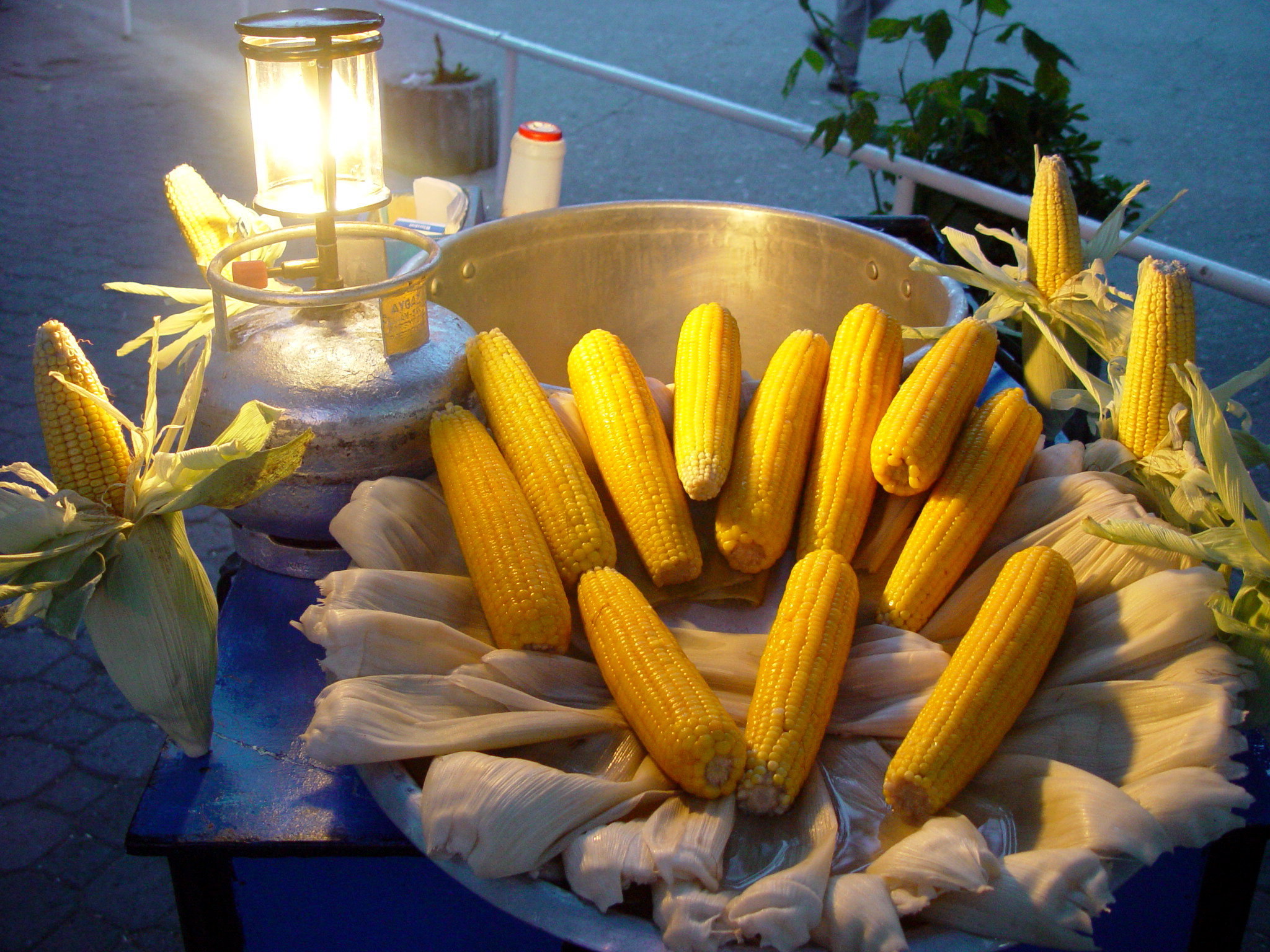 Istanbul Turkey